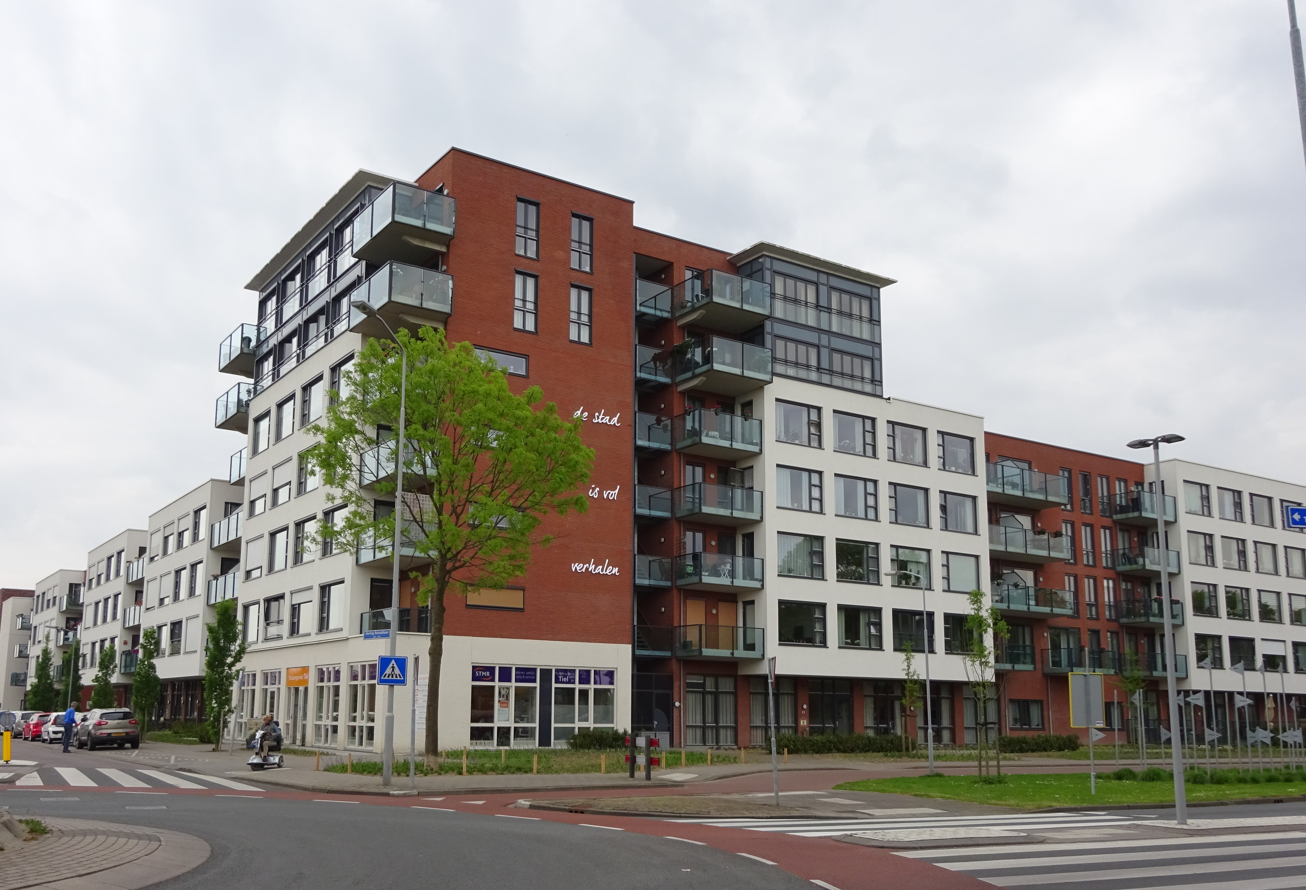 Woonzorgcomplex De Vier Gravinnen, Tiel